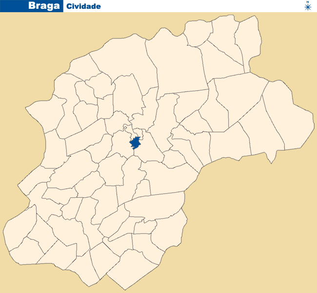 Localização de Cividade no concelho de Braga.